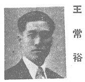 偽滿時期的王常裕